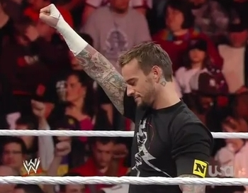 CM Punk joins The Nexus